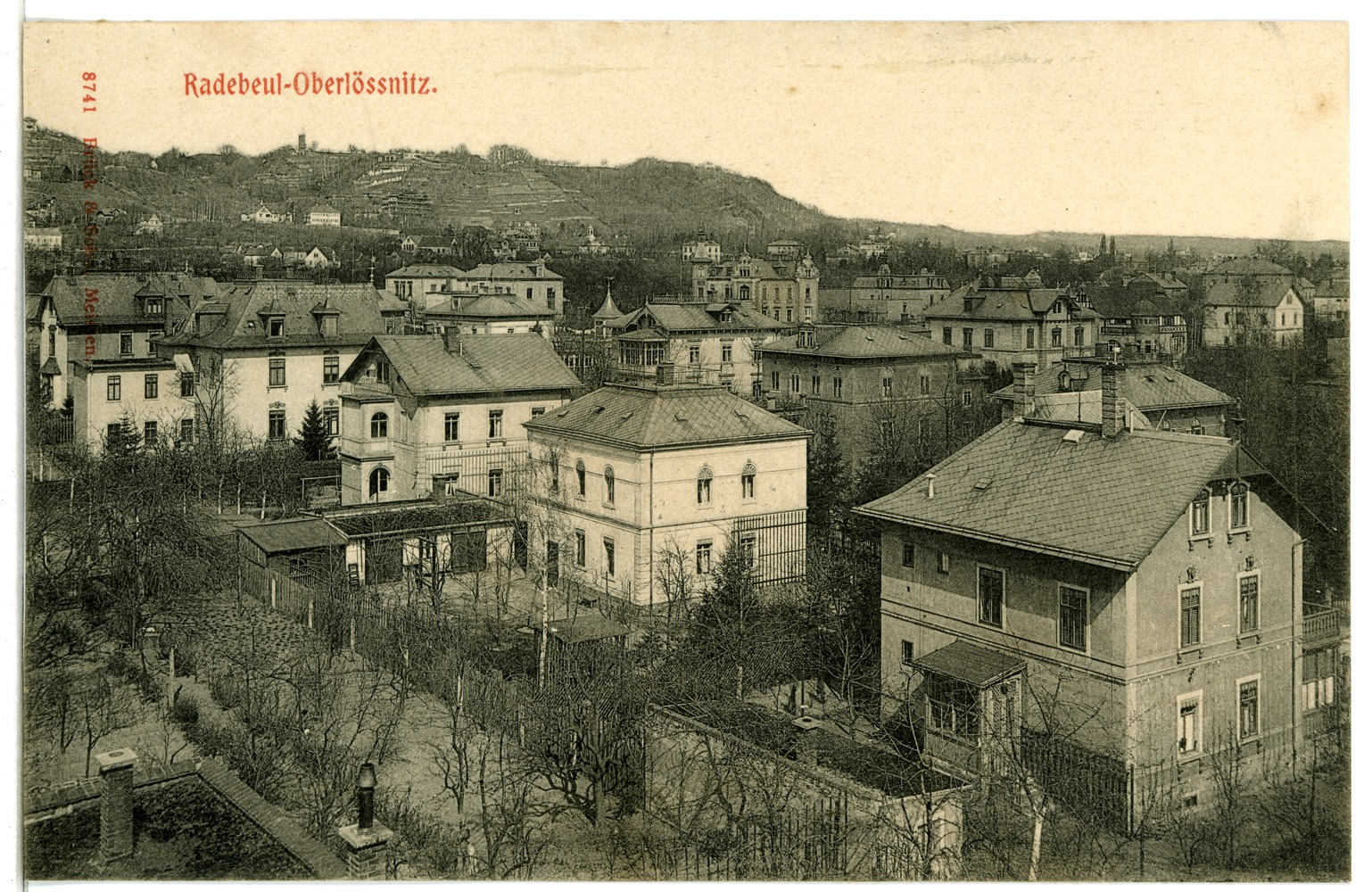 Radebeul; Blick auf die Oberlößnitz This postcard is from publisher Brück & Sohn in Meißen ( postcard has a unique number 08741 and is available in a higher resolution at the publisher. This images was uploaded in a cooperation project between Wikipedians and the publisher.